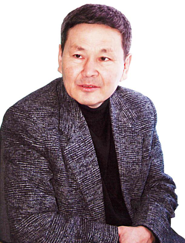 Galimbek Jumatov. Qazaqstan Jazwsilar Odaginin musesi.